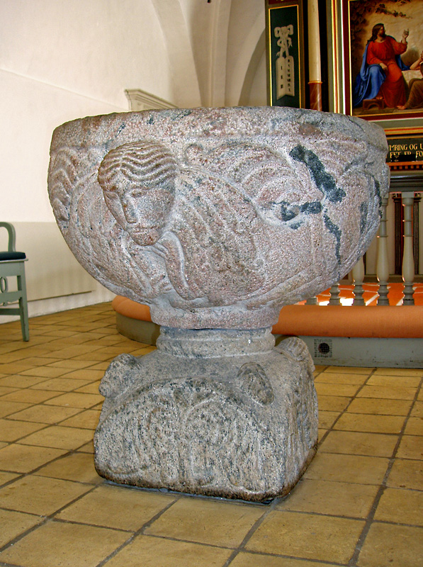 Dover Kirke - Romansk granitdøbefont Dover Sogn, Hjelmslev Herred, Skanderborg Amt / Århus Amt.